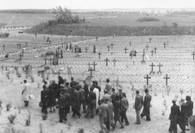 ADN-ZB-Heinscher Im Lager Gronenfelde bei Frankfurt/Oder wurde am 19. Mai 1948 der 500.000. deutsche Kriegsgefangene aus der Sowjetunion entlassen. Die Berliner Presse sowie Vertreter der Zentralverwaltung für Umsiedler, des FDB und der Volkssolidarität waren anwesend und hatten Gelegenheit, das deutsche Entlassungslager und die sowjetische Entlassungsstelle in der Hornkaserne zu besichtigen. Auf diesem gepflegten neuangelegten Friedhofsgelände sind 3.700 ehemalige deutsche Kriegsgefangene beerdigt. Sie starben in der Zeit vom 23.9.1945 bis 6.9.1946. Alle später Verstorbenen sind auf den städtischen Friedhof in Frankfurt/Oder beerdigt. Die Sterbeziffer hat in den letzten Jahren sehr stark nachgelassen. Im Januar 48 verstarben 6 ehemalige Kriegsgefangene, im Februar 8, im März 7 und im April 13.